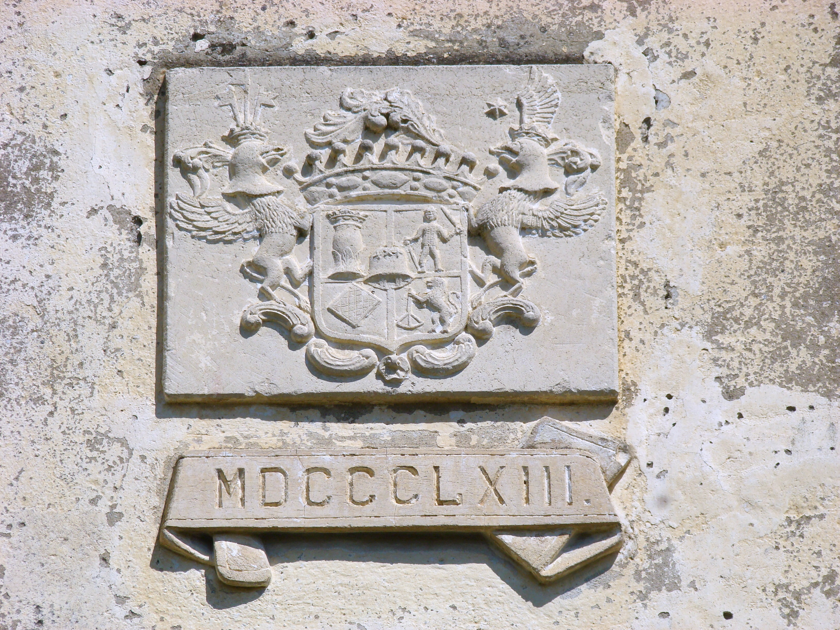 Castelul Bethlen, sat Sânmiclăuș; comuna Șona 01